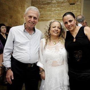 בהשקת ספרה של עפרה נחמד "לאור פרשות השבוע" יולי 2014